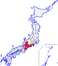 東海地方の位置